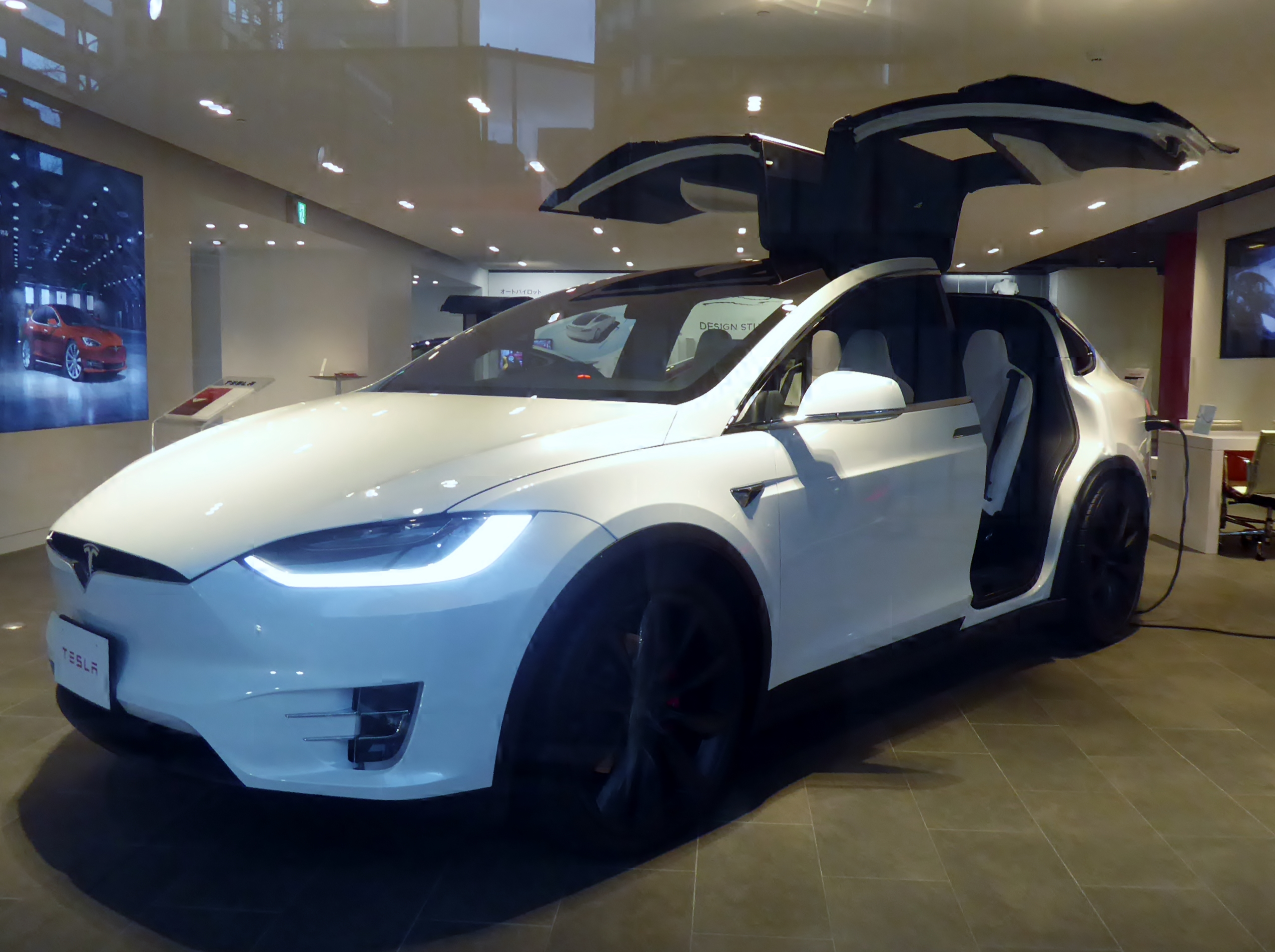 テスラ・モデルXを撮影。